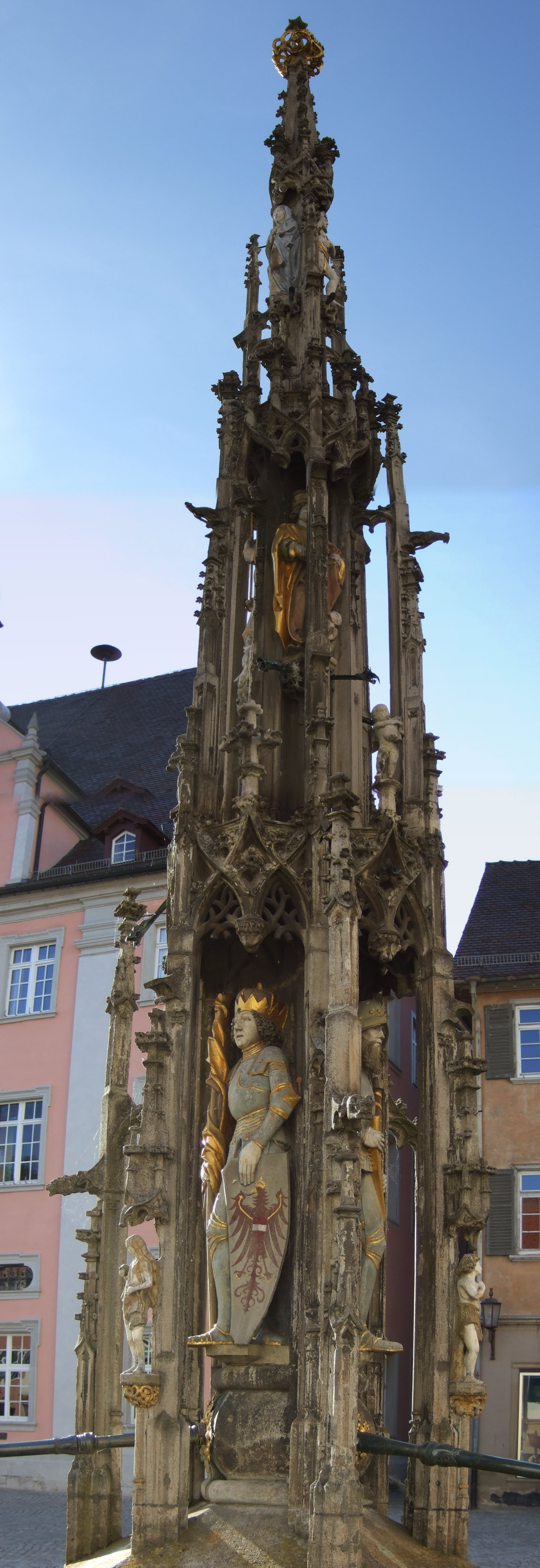 Marktbrunnen in Rottenburg am Neckar. Kopie von 1911 des Originals von 1482/83 (in der St. Moriz-Kirche)